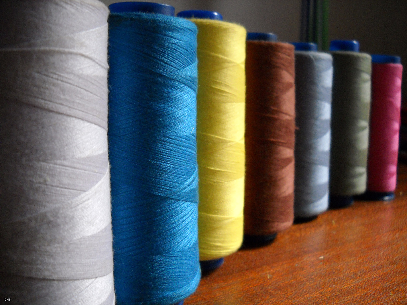 Bobines